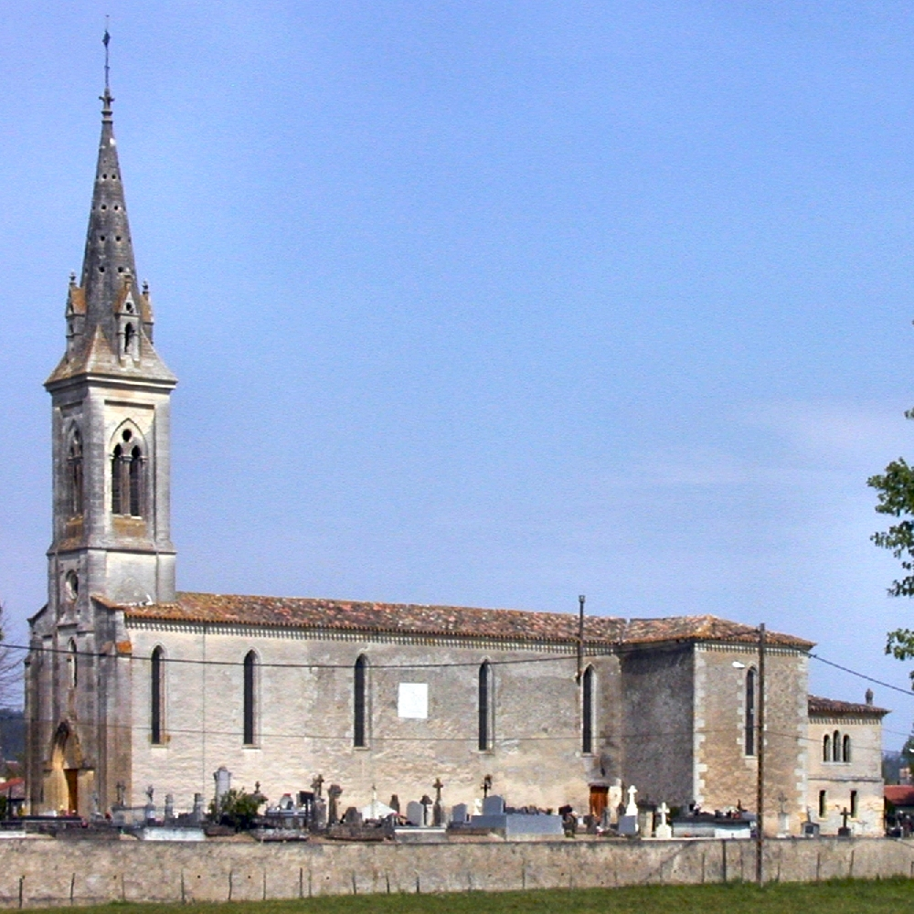 Photo de l'église Saint Étienne du Fleix.